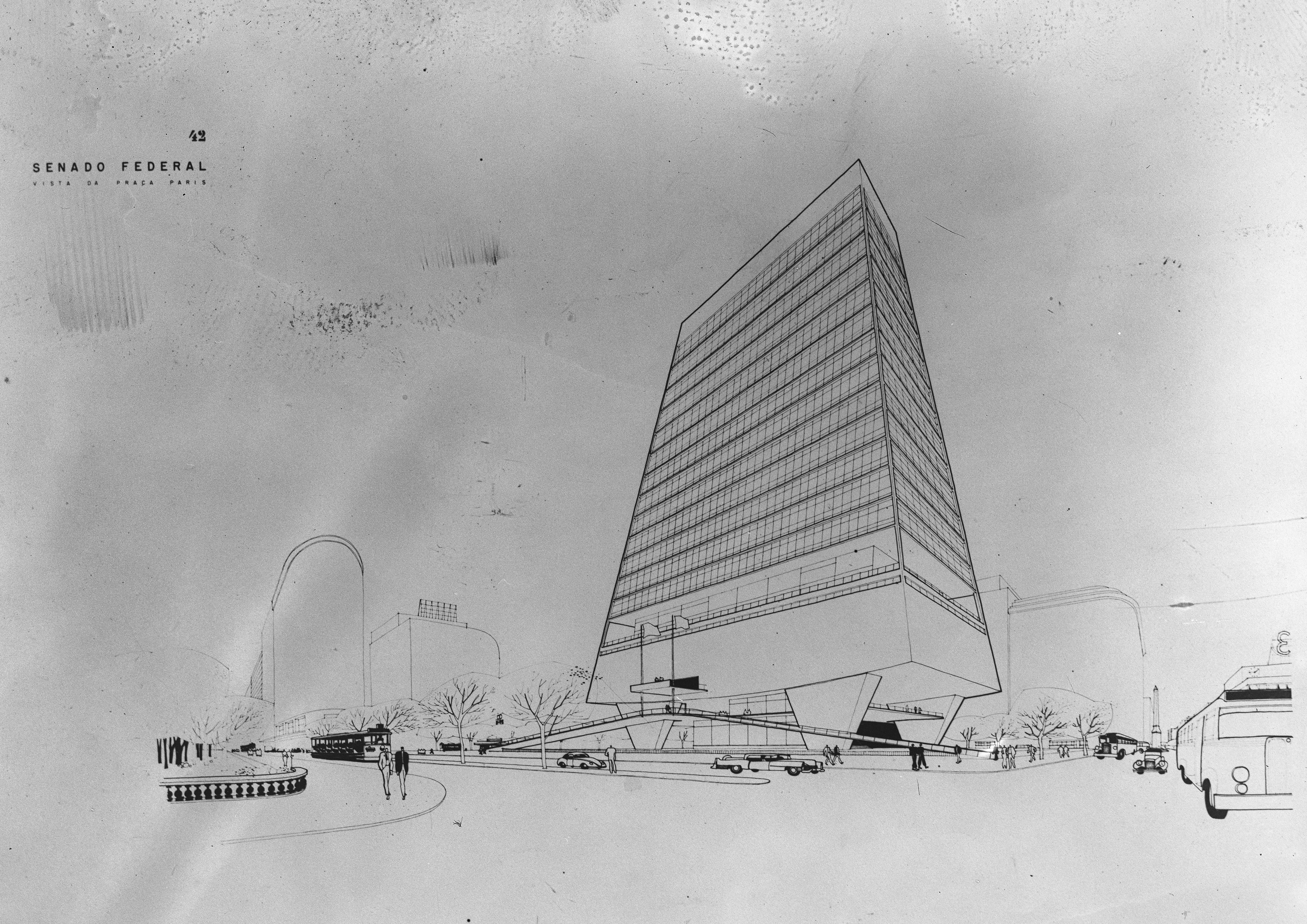 Imagem do Fundo Agência Nacional.